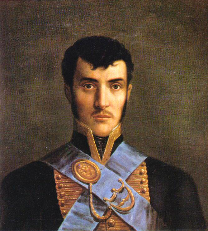 Retrato del caudillo revolucionario ecuatoriano Carlos de Montúfar (1780-1816)